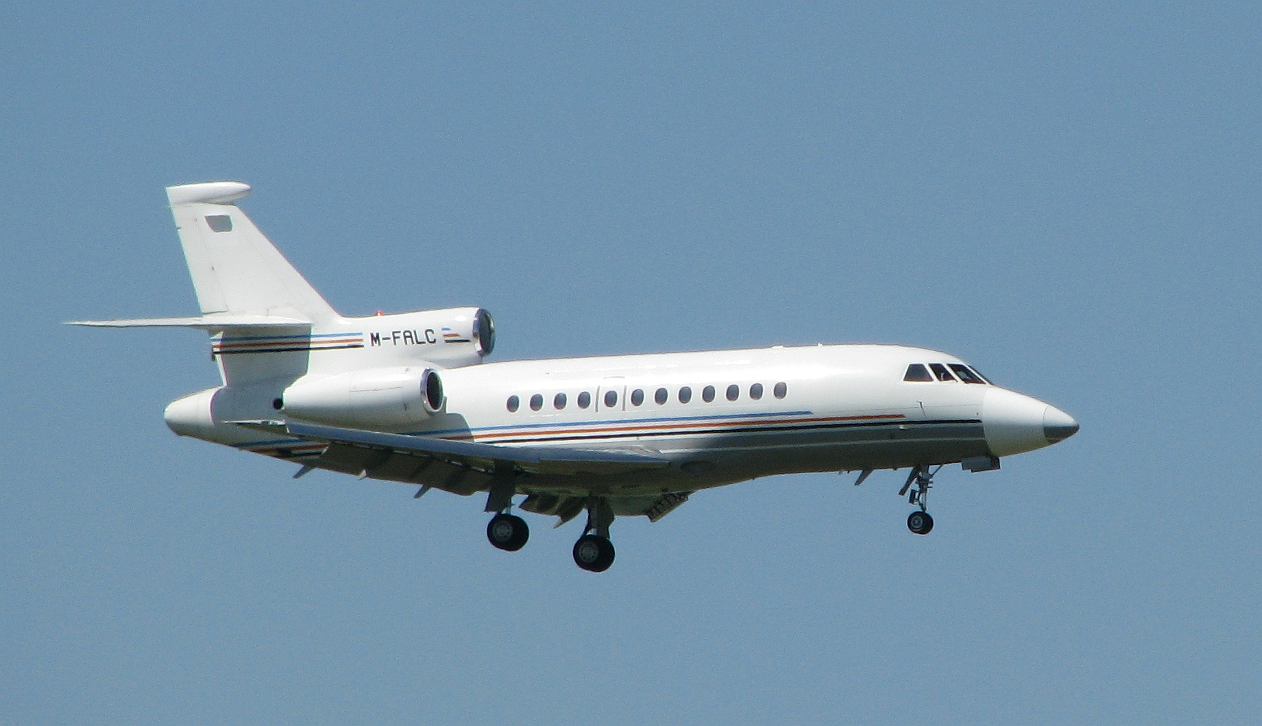 Dassault Falcon 900EX M-FALC (at MUC) with S-duct